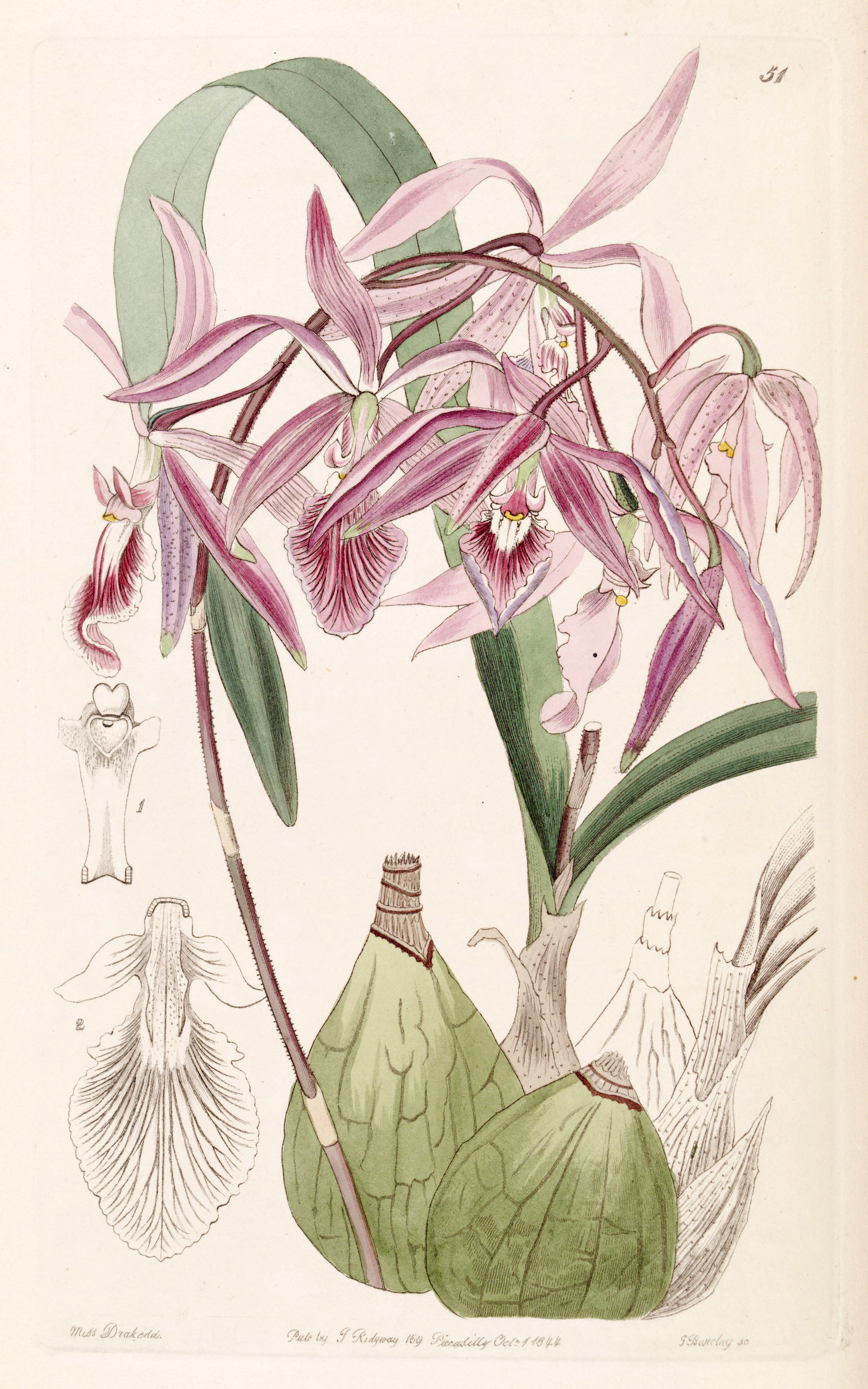 Encyclia adenocaula (as syn. Epidendrum verrucosum)